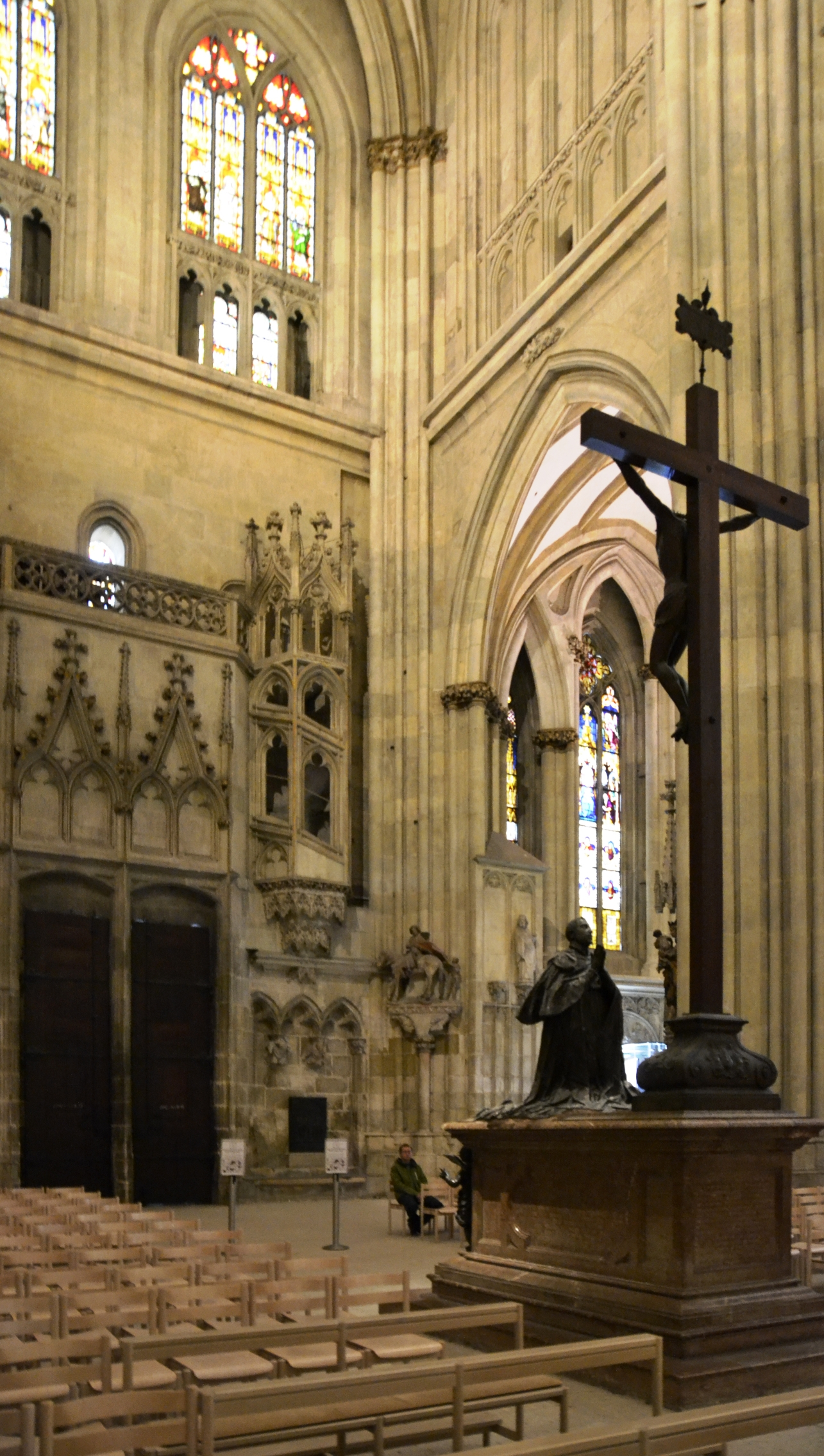 Im Inneren des Regensburger Doms. Grabdenkmal Bischof Philipp Wilhelm von Bayern